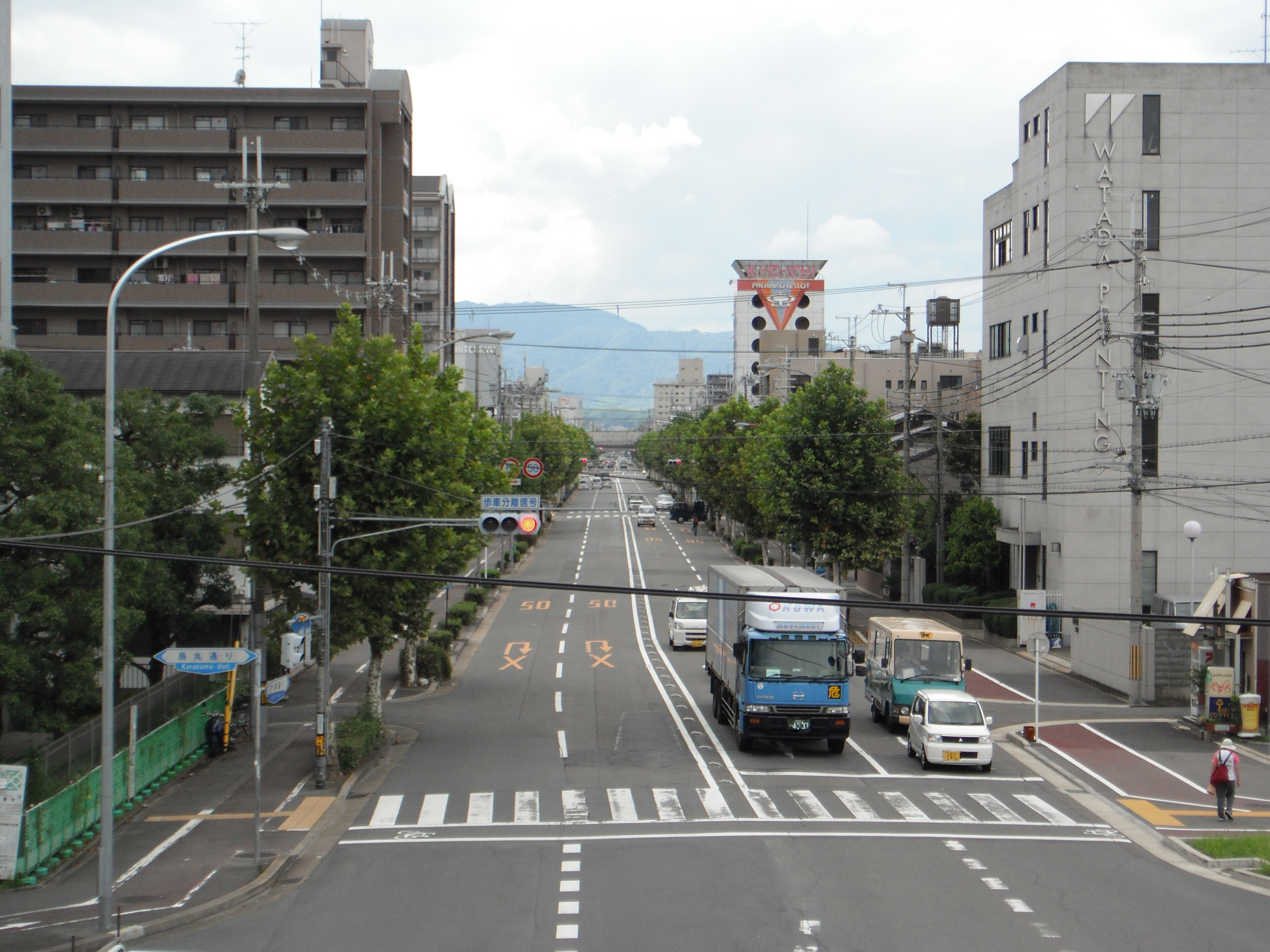 Jujo Karasuma West Side, Jujo Karasuma, Minami, Kyoto, Kyoto, Japan.